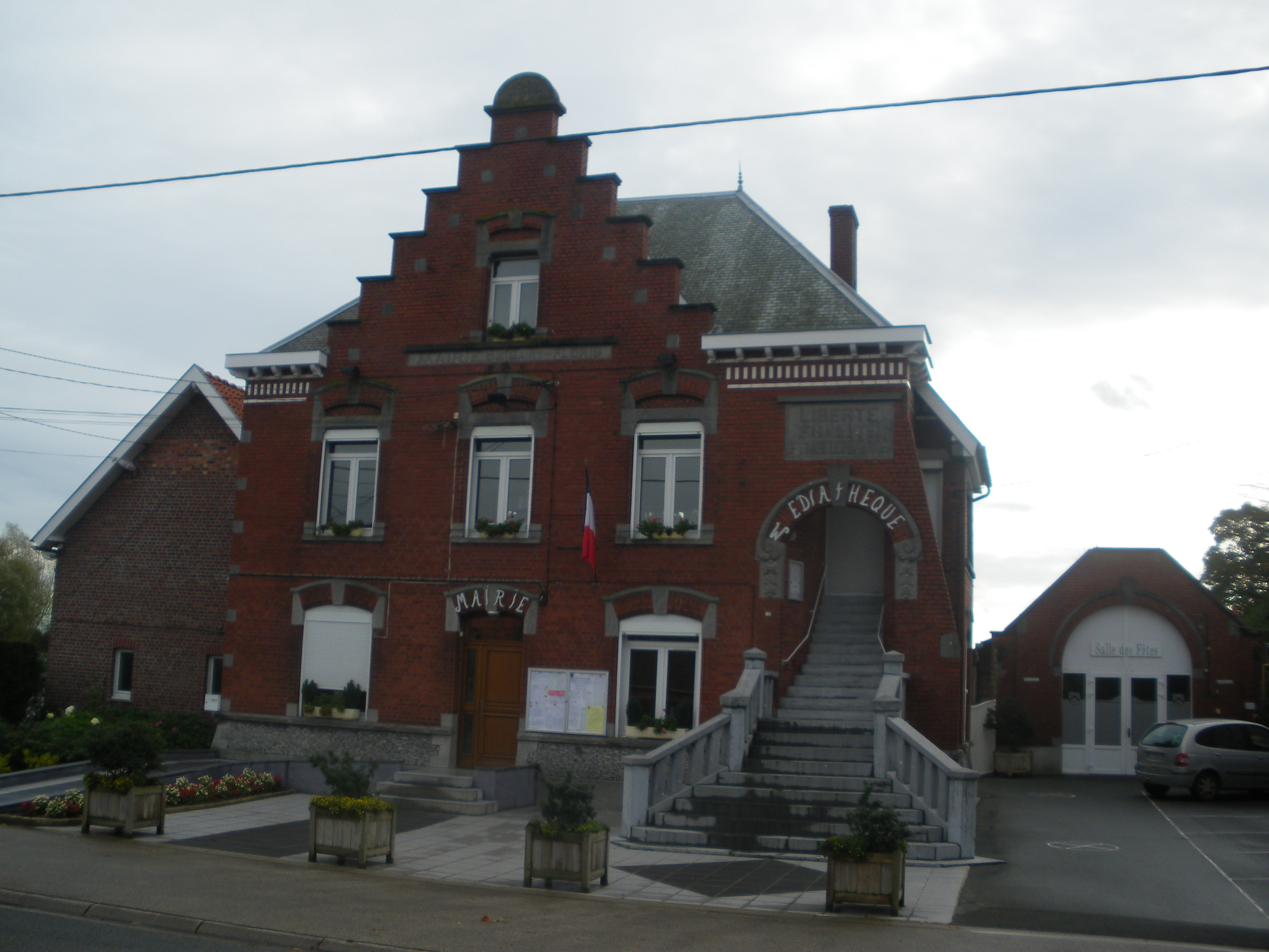 La mairie de Saint-Floris + la salle des fêtes.